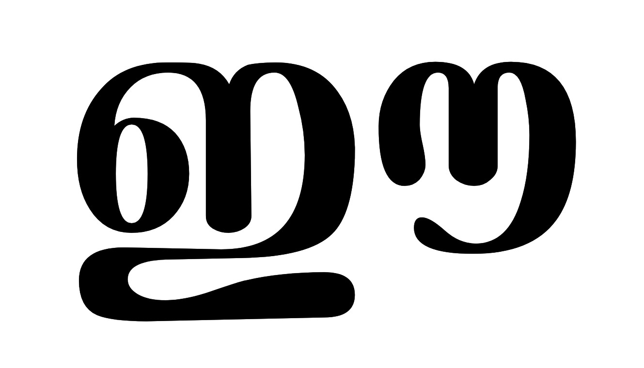 ഈ മലയാളം അക്ഷരം